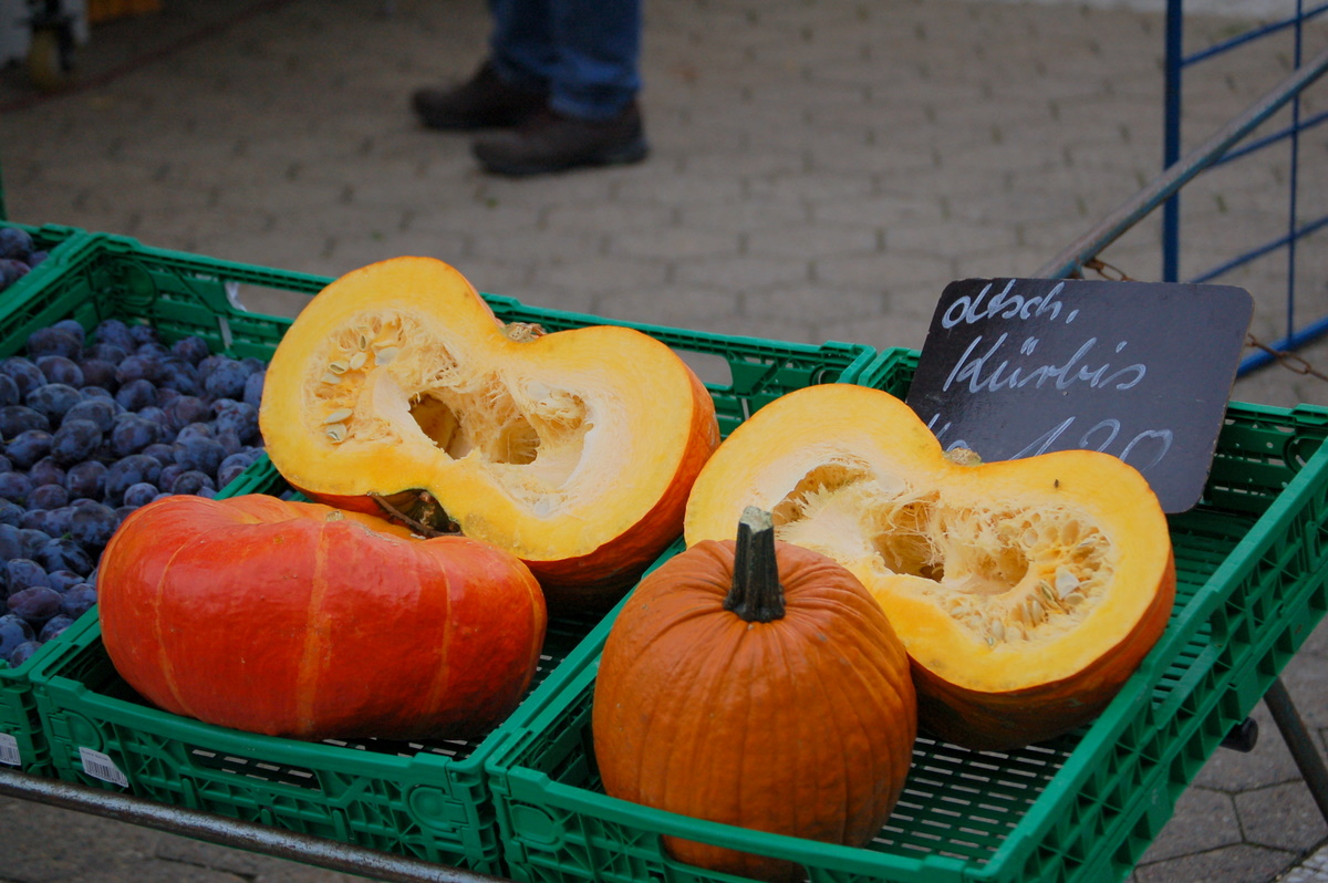 Cucurbita